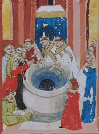 Křest